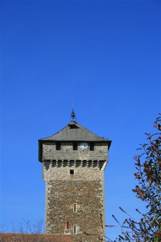 Tour médiévale devenu clocher de l'église fortifiée de Sainte-Croix (Aveyron).